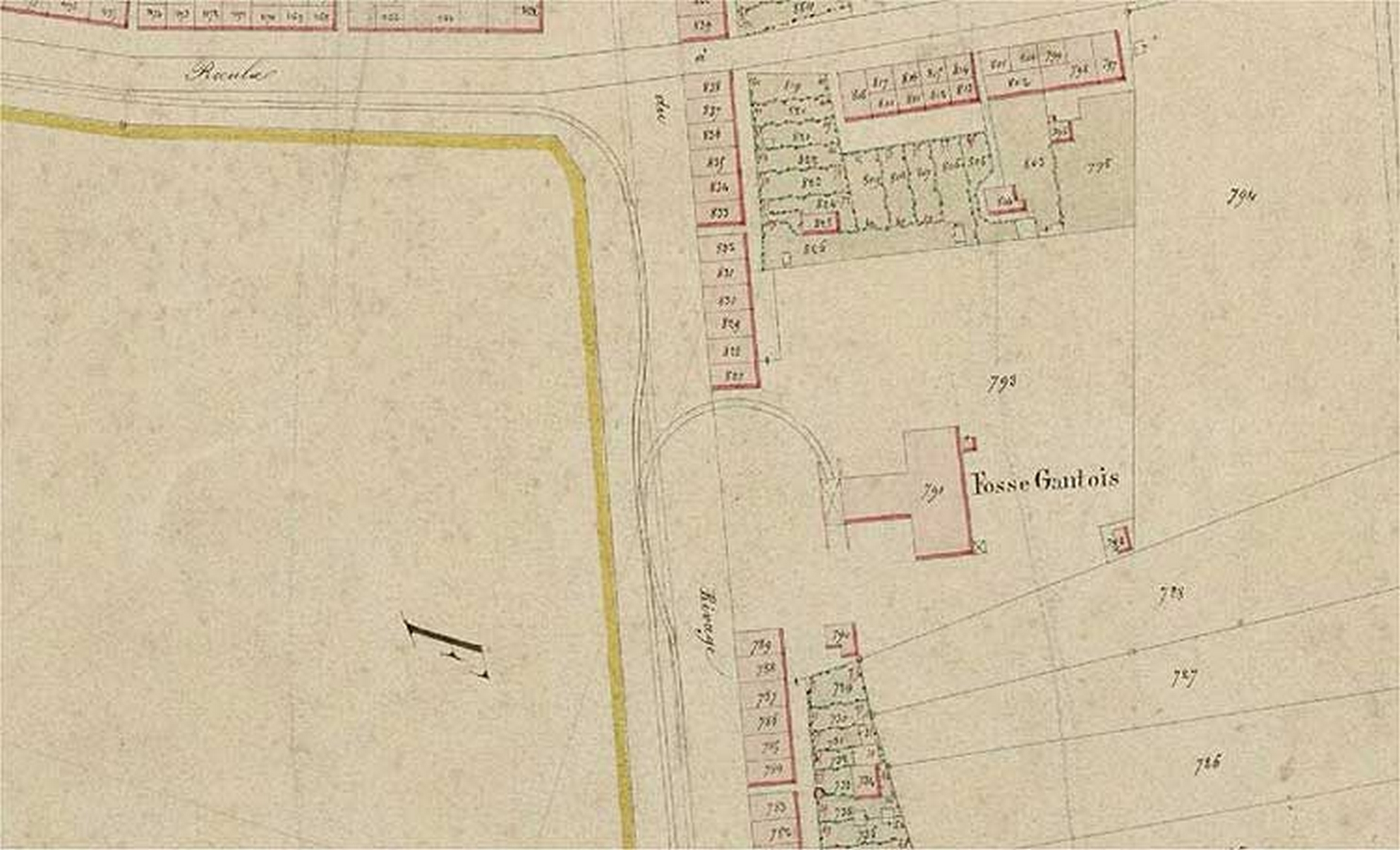 La fosse Gantois ou n° 3 de la Compagnie des mines de Douchy était un charbonnage constitué d'un seul puits situé à Lourches, Nord, Nord-Pas-de-Calais, France.